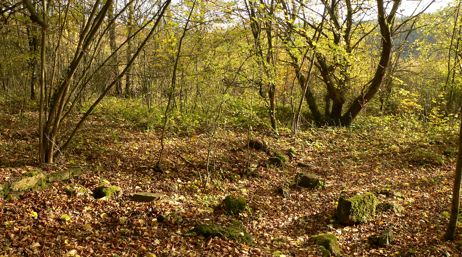 Römischer Gutshof „Im Weiler“